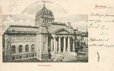 Barmer Ruhmeshalle, Heute Wuppertal "Haus der Jugend"